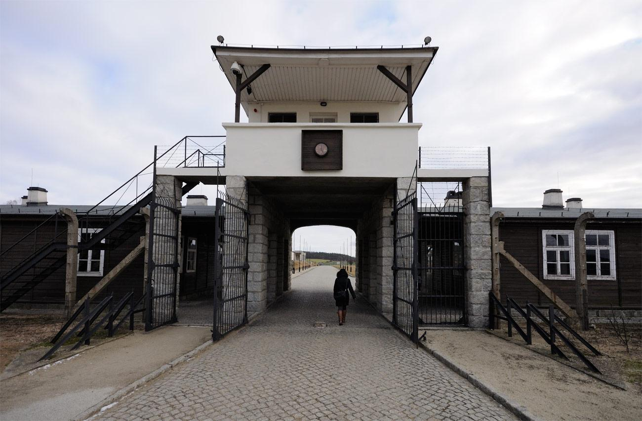 Brama obozowa widziana od zachodu.